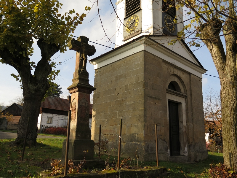 Socha Ukřižování, náves, st. 103 k. ú. Nadslav, Štidla.